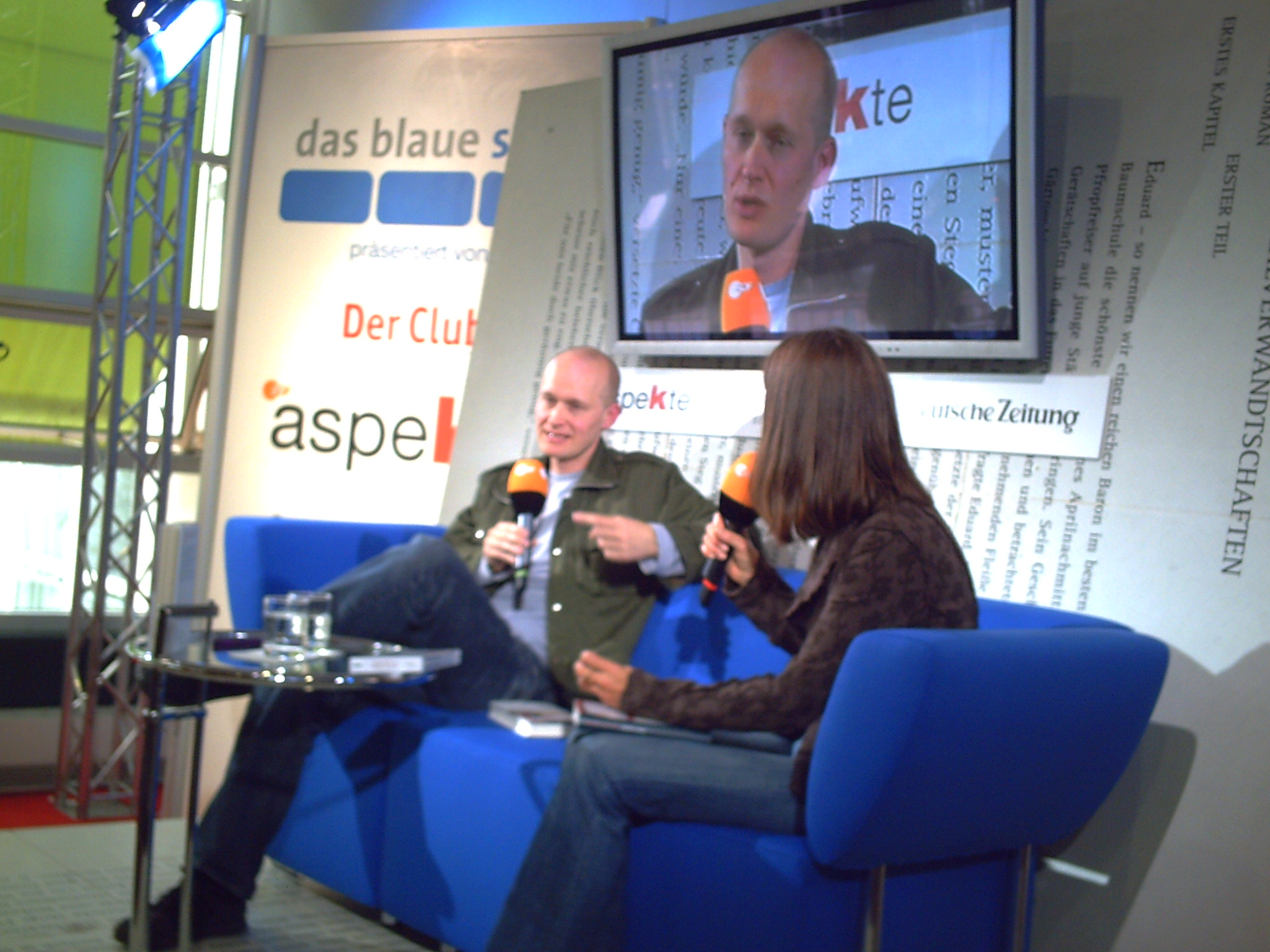 Der Autor Arno Geiger (siehe hier in de.wikipedia) mit seinem Buch "Anna nicht vergessen" auf der Frankfurter Buchmesse 2007.